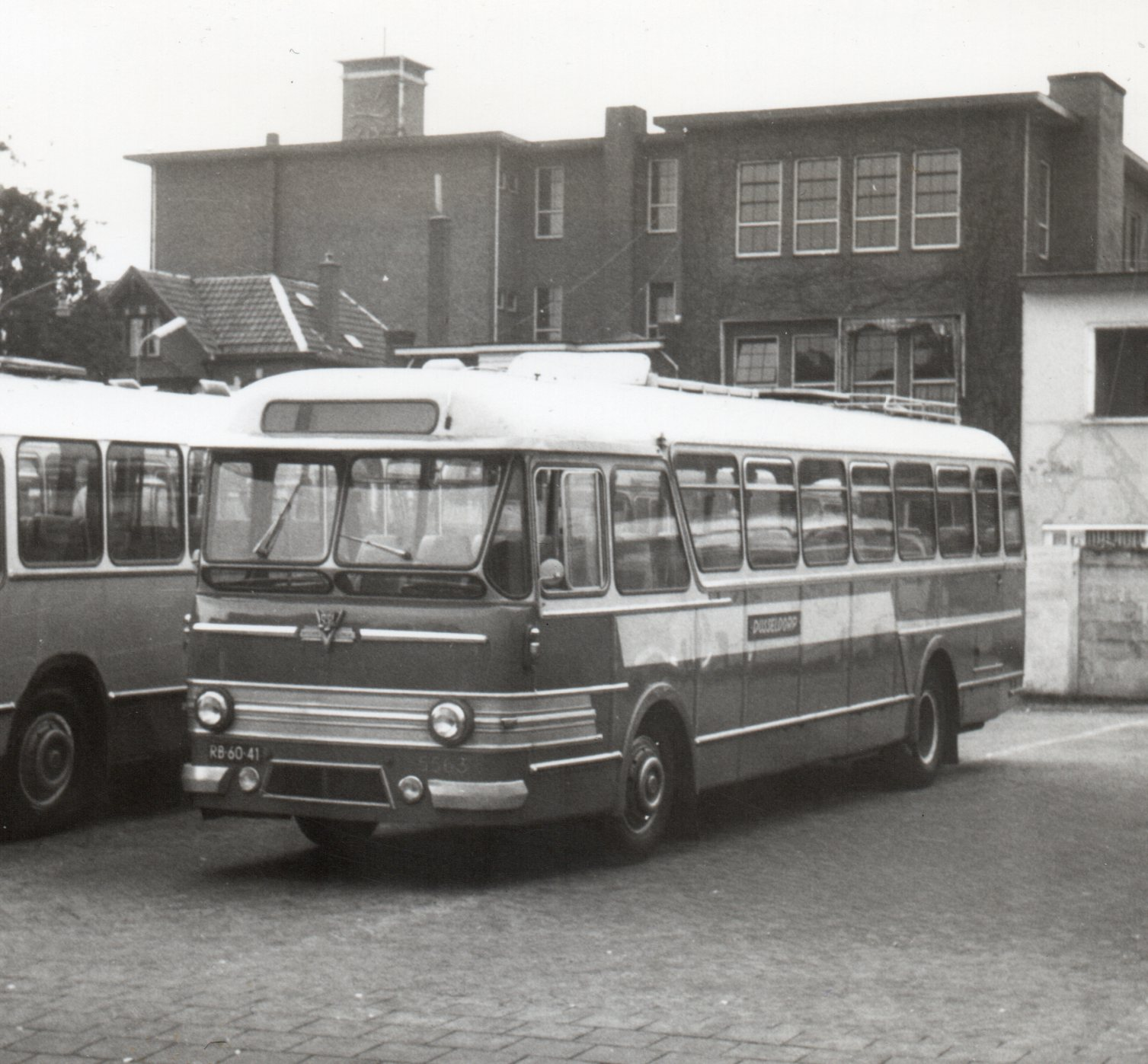 VAD bus 5563 in de kleuren van Dusseldorp te Apeldoorn, juli 1969